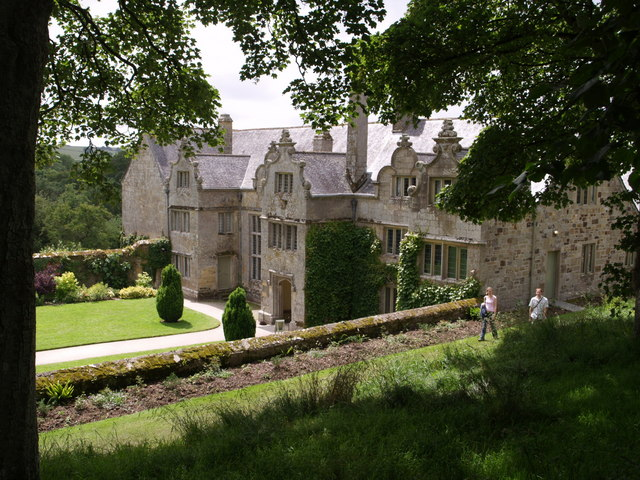 Trerice